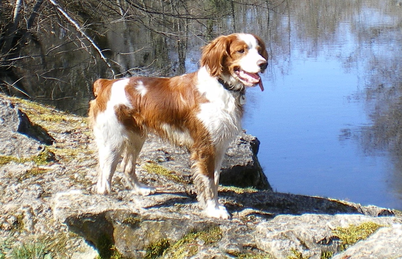 Epagneul bretoi arrazako txakurra. Burgosen ateratako argazkia.